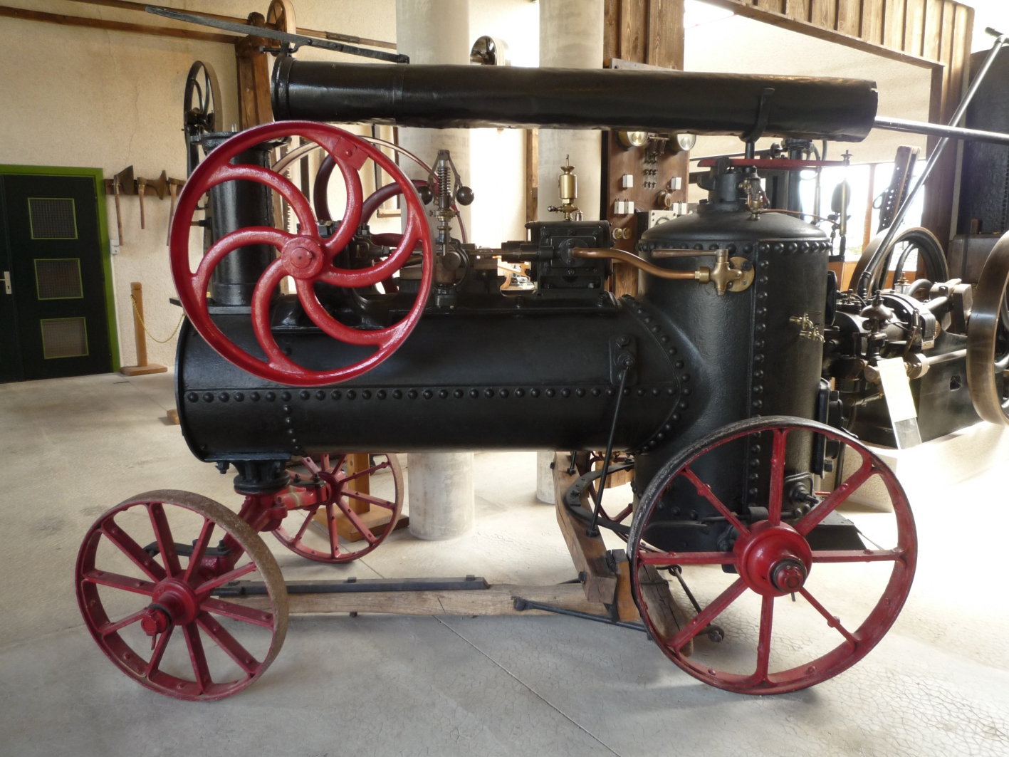 La société Millot, fondée à Gray en 1804 arrêta sa production de machines à vapeur dans les années 1890 pour se consacrer à la construction de moteurs.